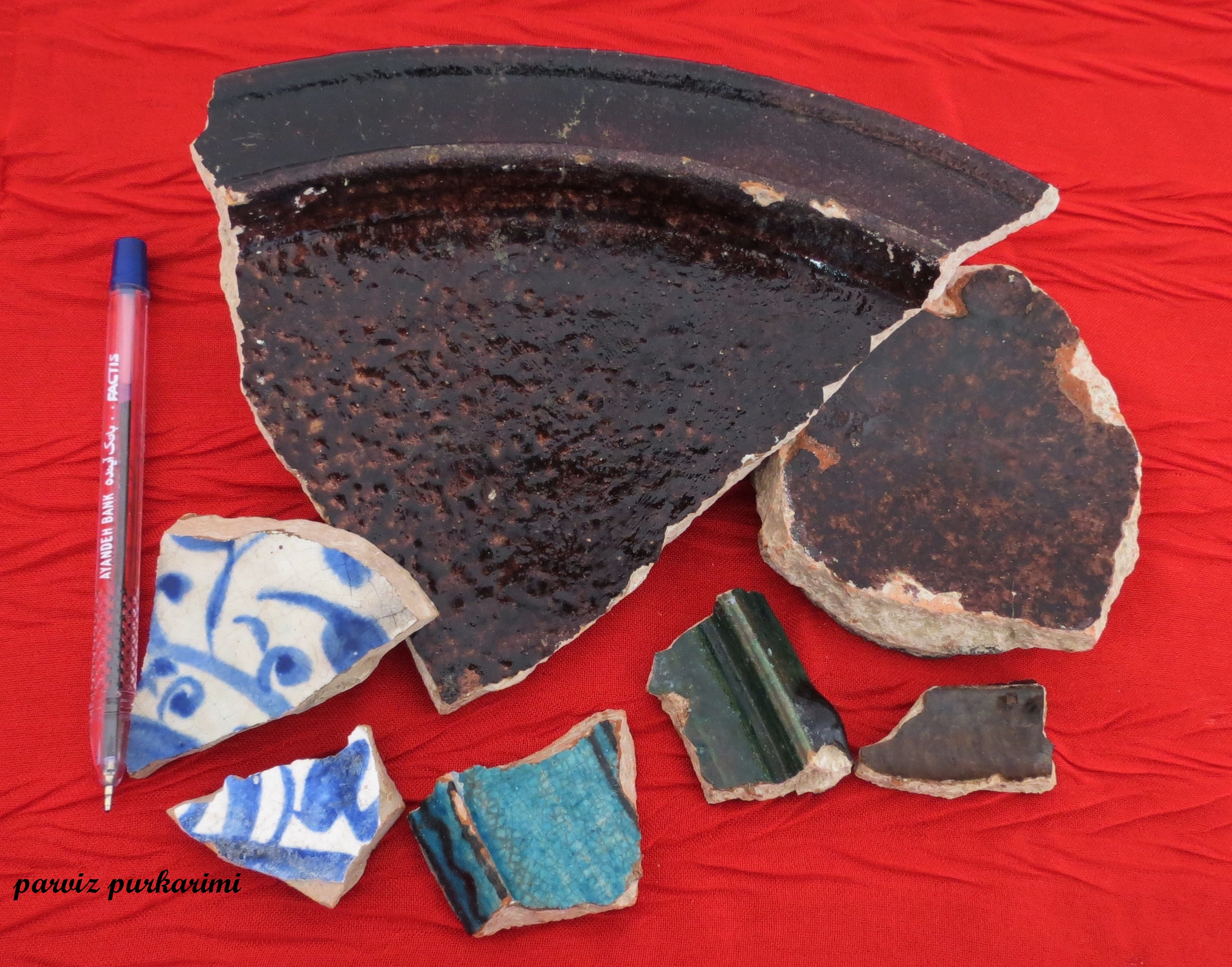 تکه سفال های لعابدار سلجوقی (قرن پنجم قمری) و صفوی (قرن دهم قمری) یافت شده در زمین های کشاورزی شهر عاشقلو